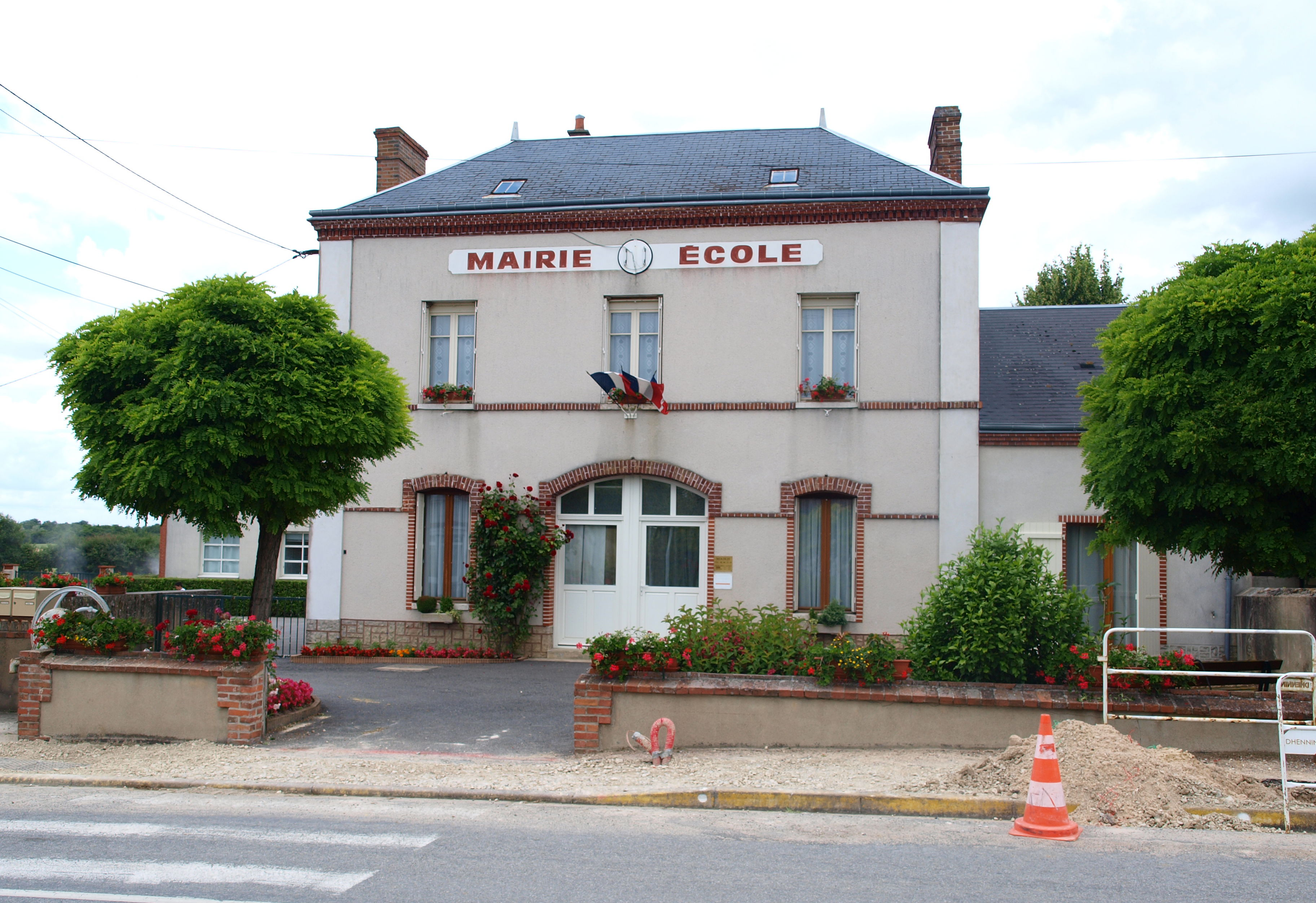 Oussoy-en-Gâtinais (Loiret, France) , mairie